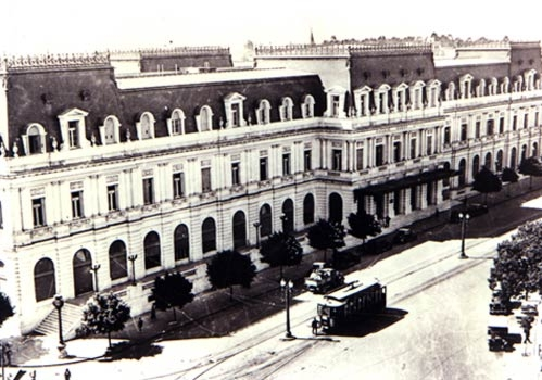 Foto antigua del Pasaje Dardo Rocha de la ciudad de La Plata, capital de la provincia de Buenos Aires, Argentina.